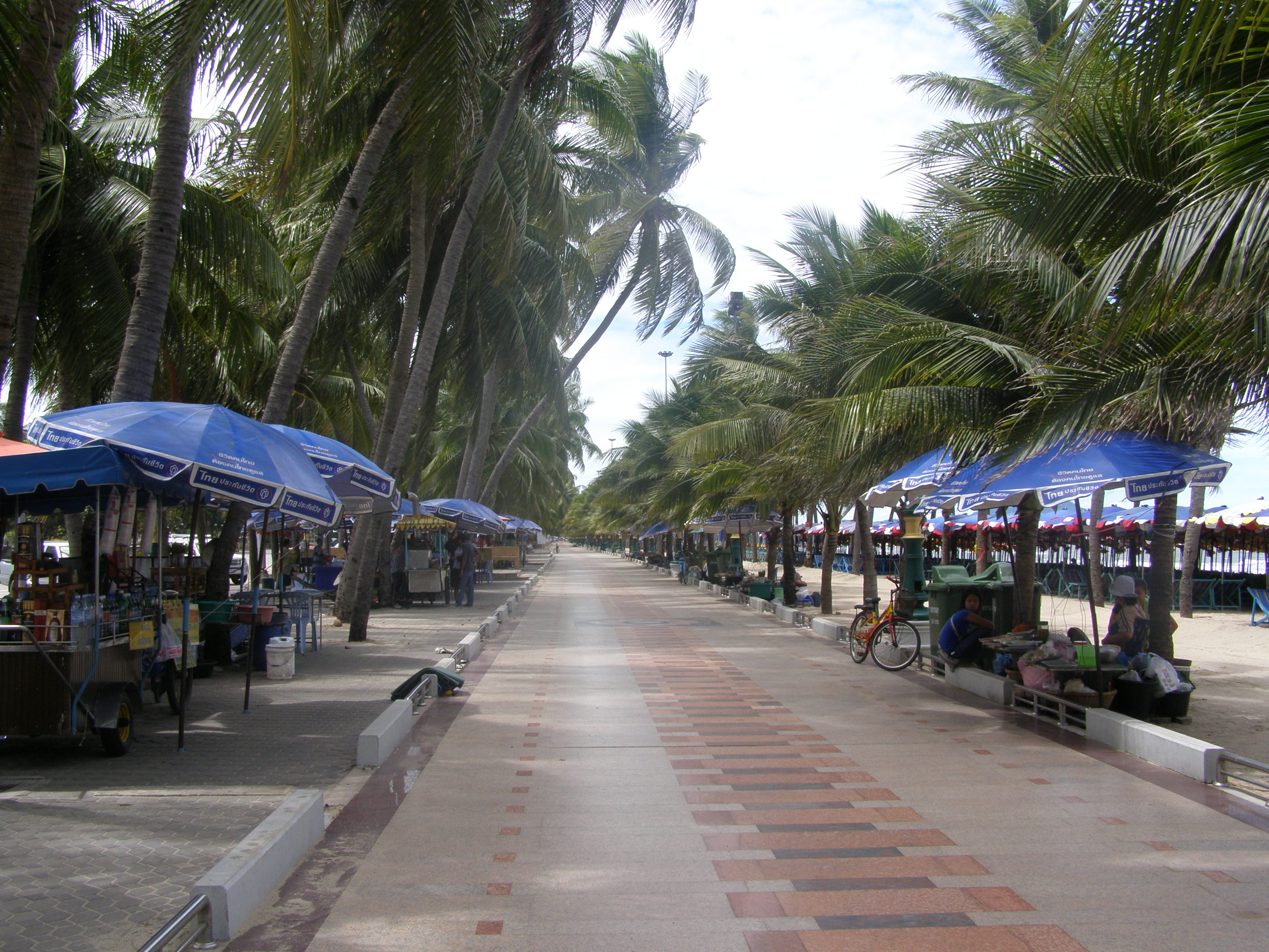 View Bang Saen